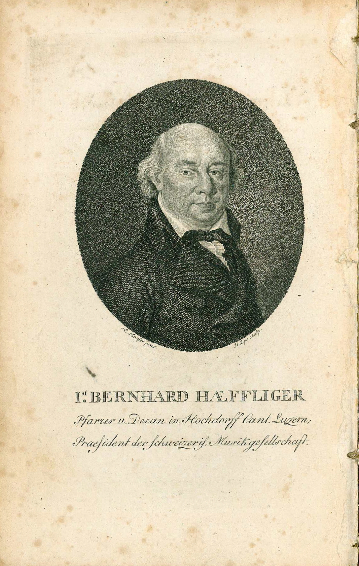 Jost Bernhard Häfliger (1759–1837), Schweizer Pfarrer und Dichter